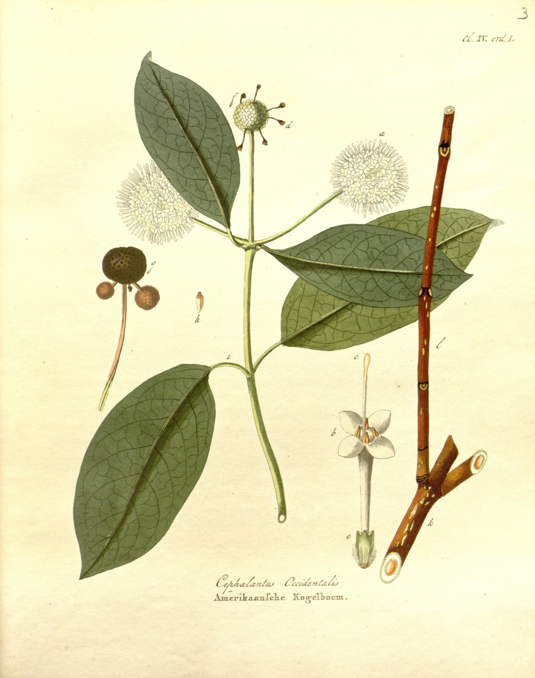 cu J\: c?7/.j. om.